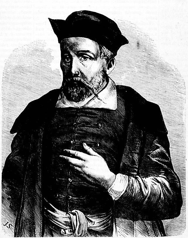 Michał Sędziwój 1556-1636